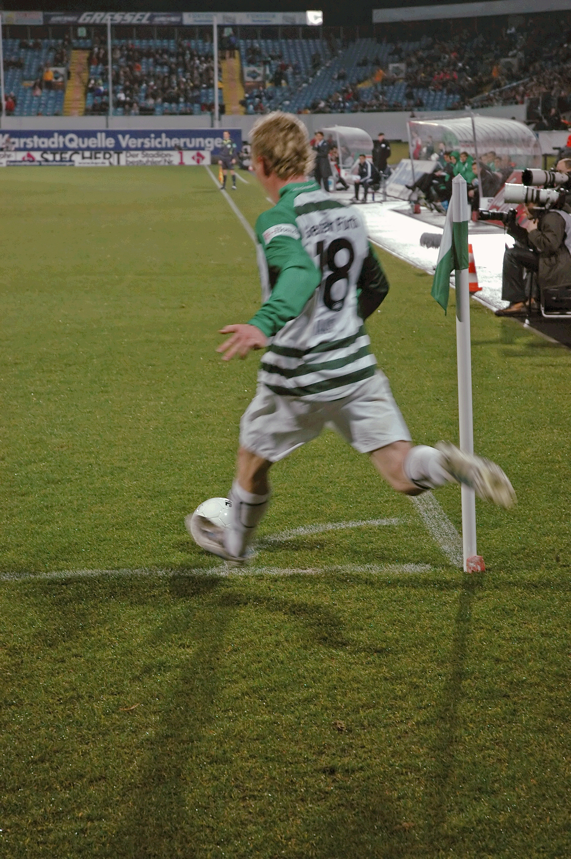 Leonard Haas beim Eckstoß